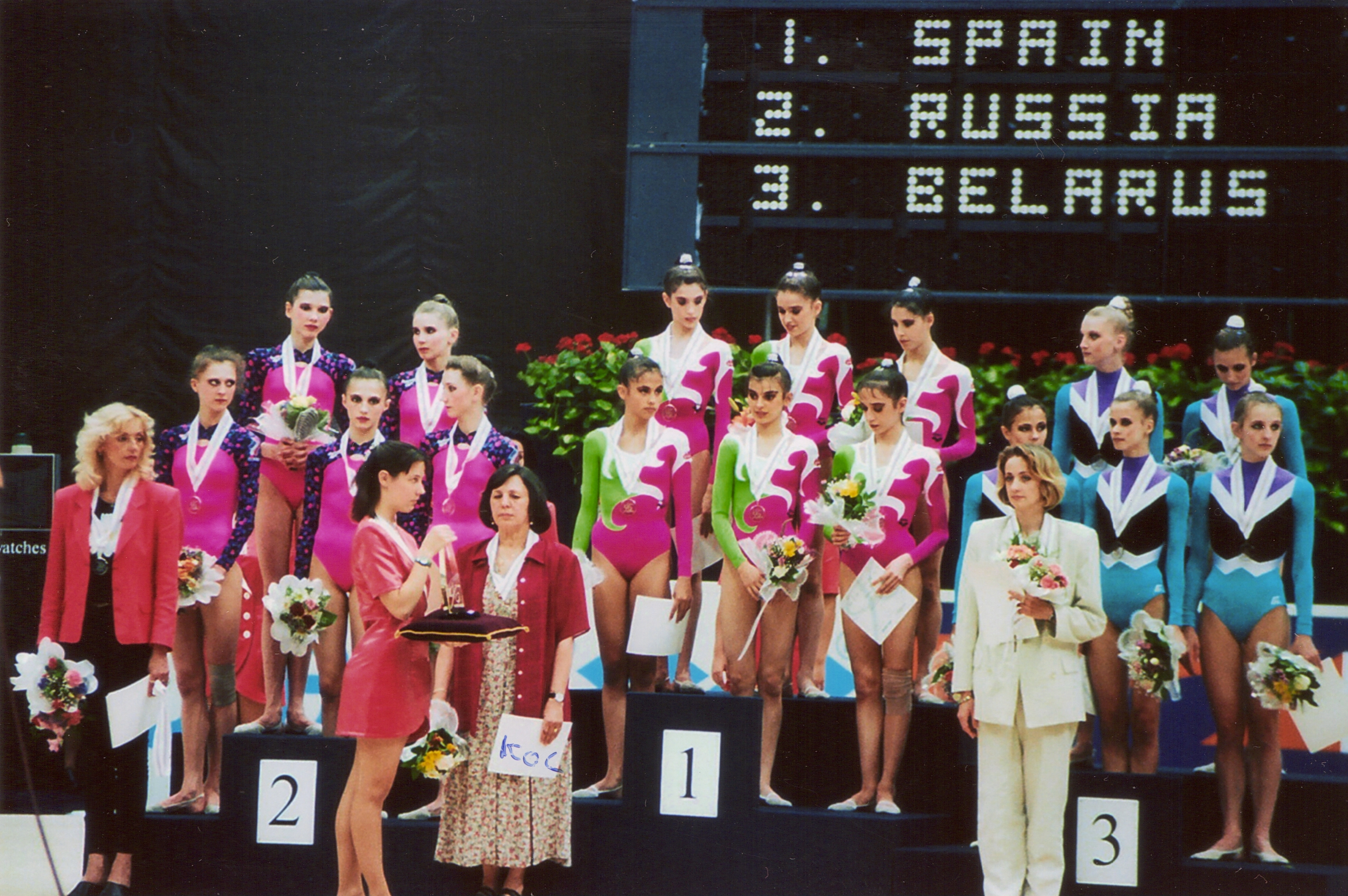 Podio de la final de 3 pelotas y 2 cintas en el Campeonato Mundial de Gimnasia Rítmica de 1996 en Budapest. De izquierda a derecha: Rusia, España y Bielorrusia.